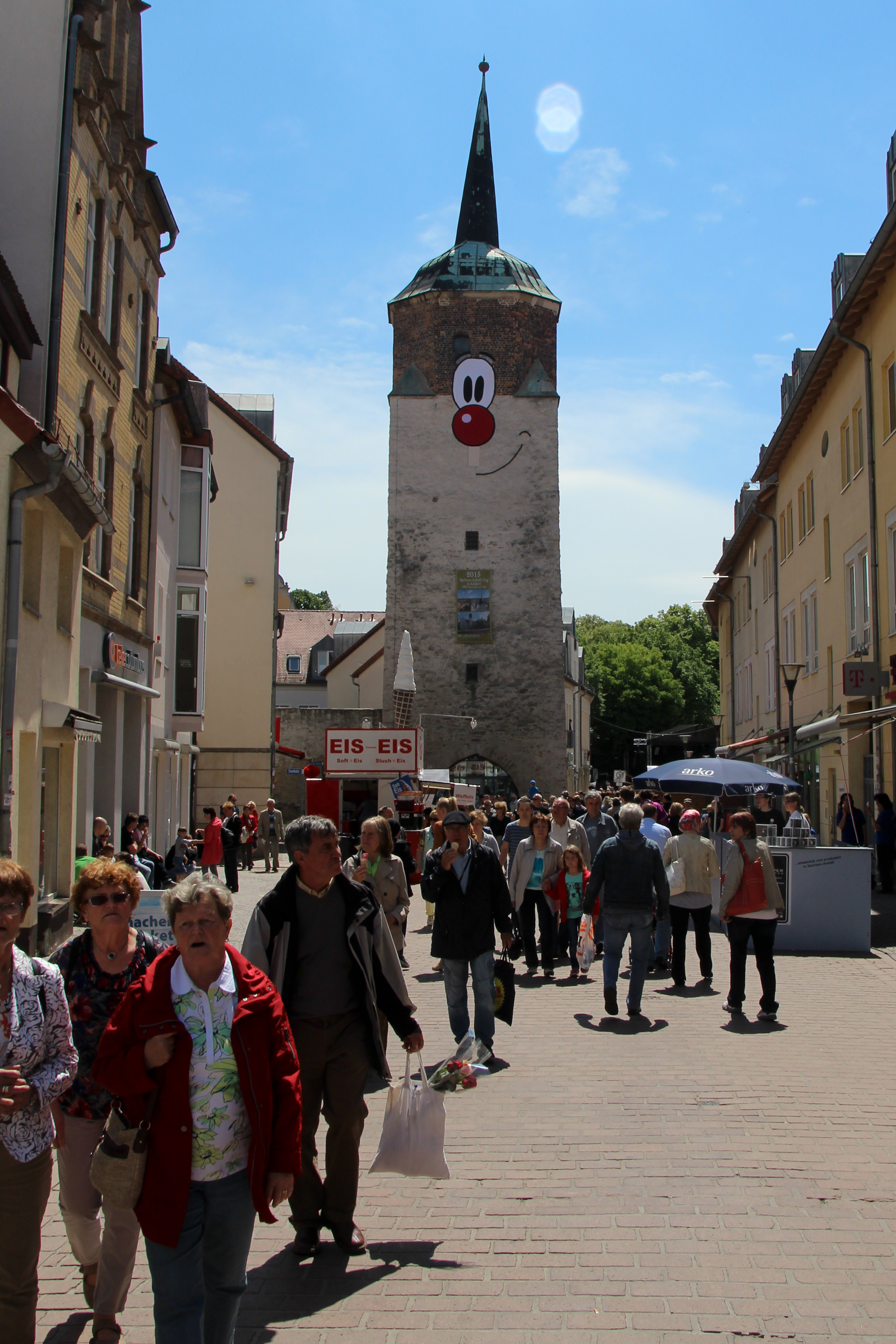 Der Sachsen-Anhalt-Tag 2015 in Köthen. Sachsen-Anhalt-Tag 2015